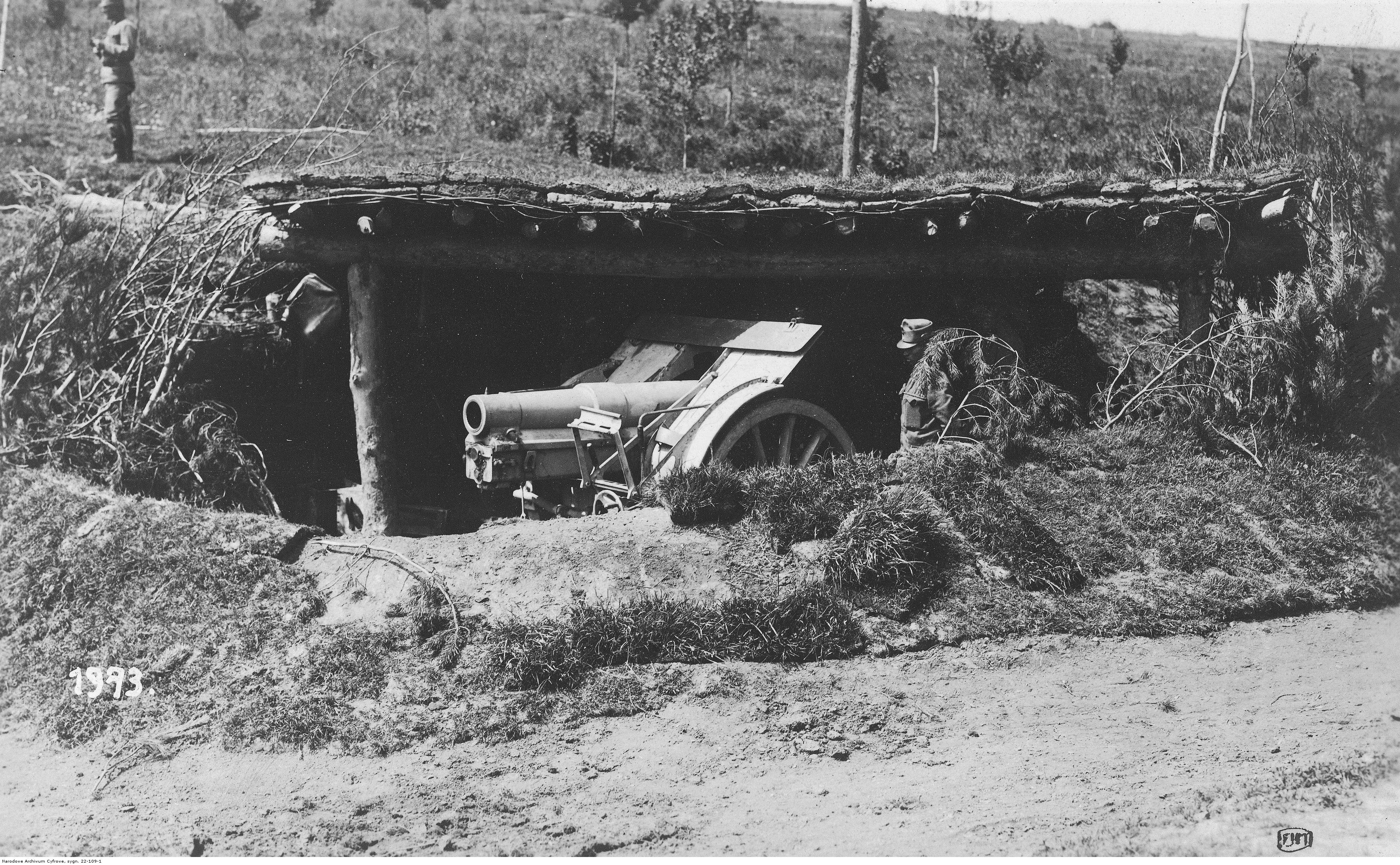 Działo na stanowisku ogniowym.